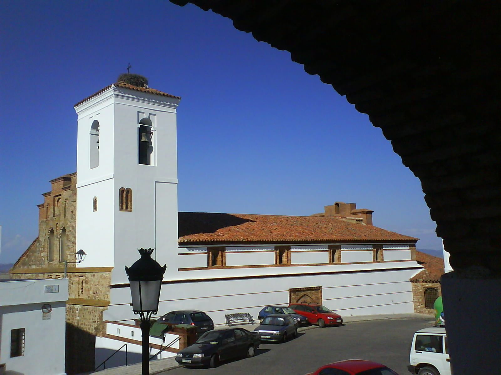 Parroquia de Santiago apóstol